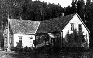 Volkshochschule Vonheim in Gausdal, Norwegen